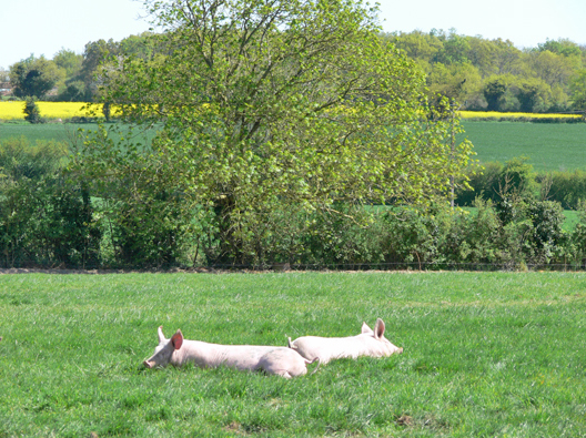 Porc fermier de Vendée élevé en plein air